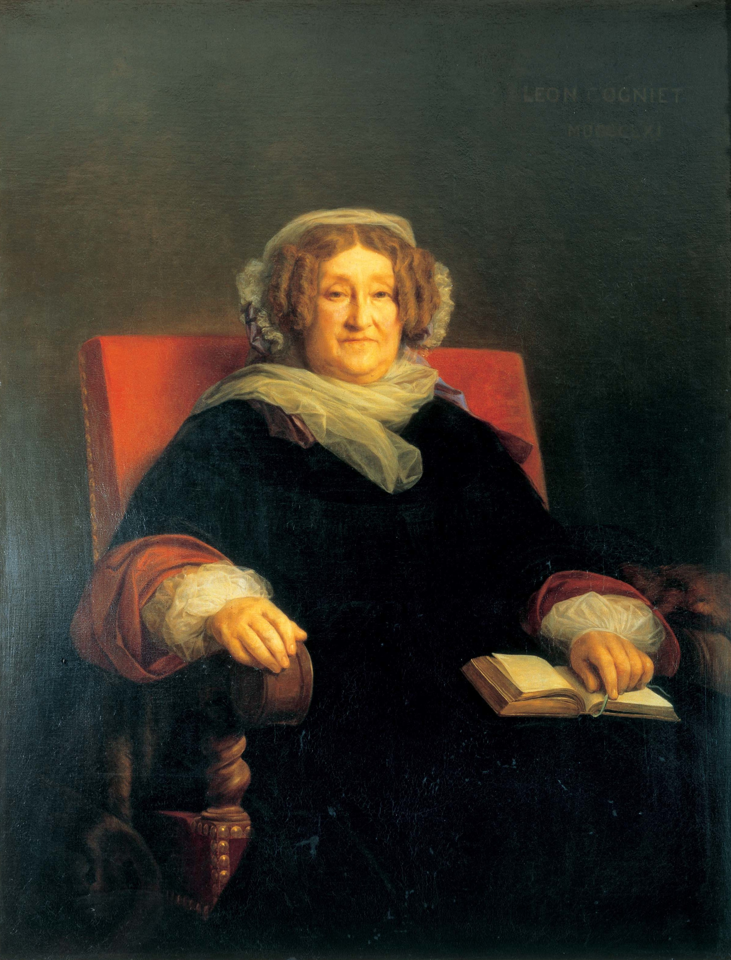 Célèbre portrait de la Veuve Clicquot